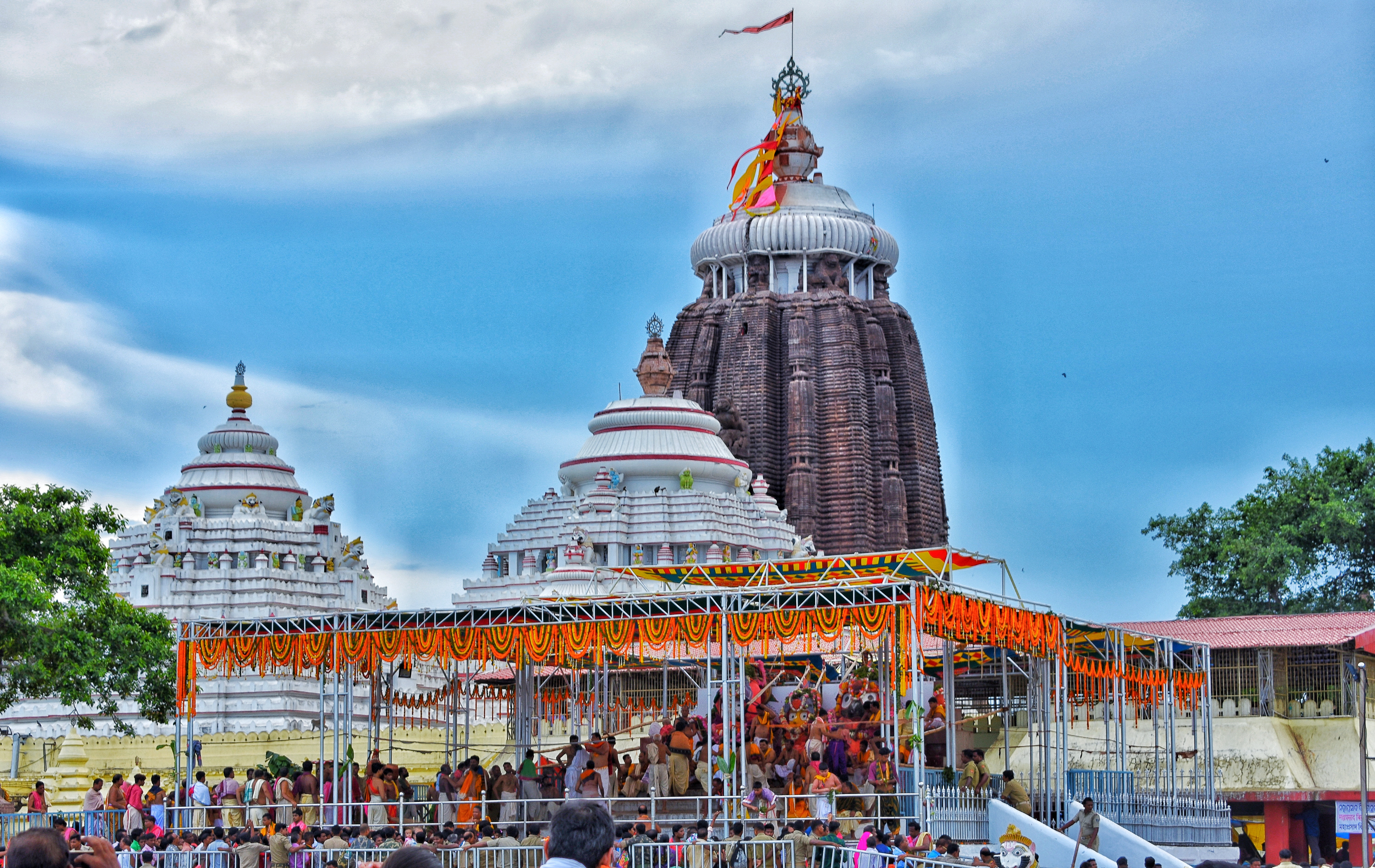 Nilakandara